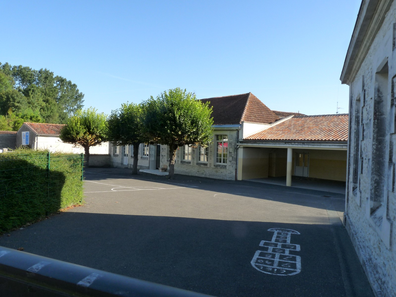 Ecole, Pérignac, Charente-Maritime, France